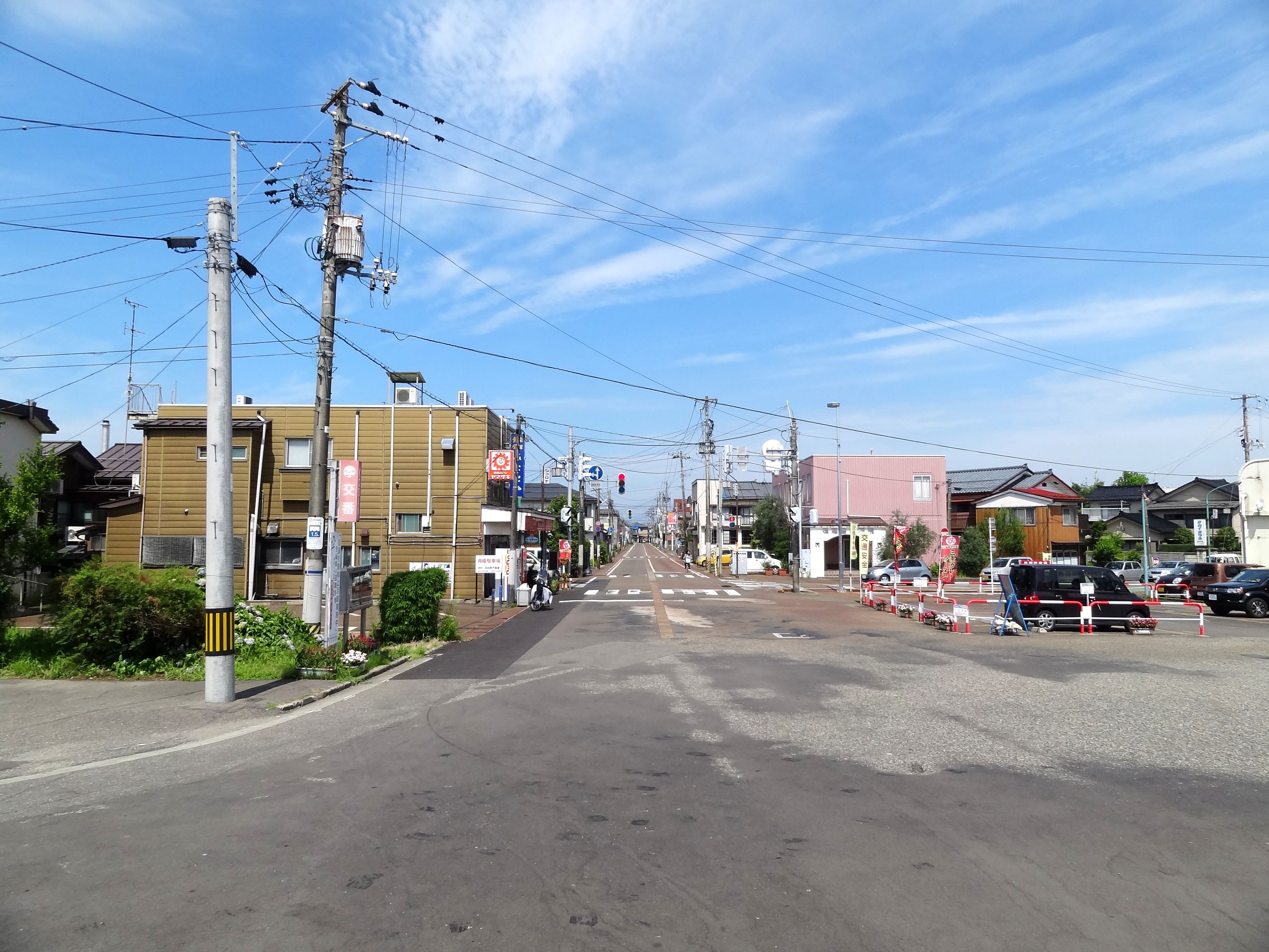 新潟県 三条駅前